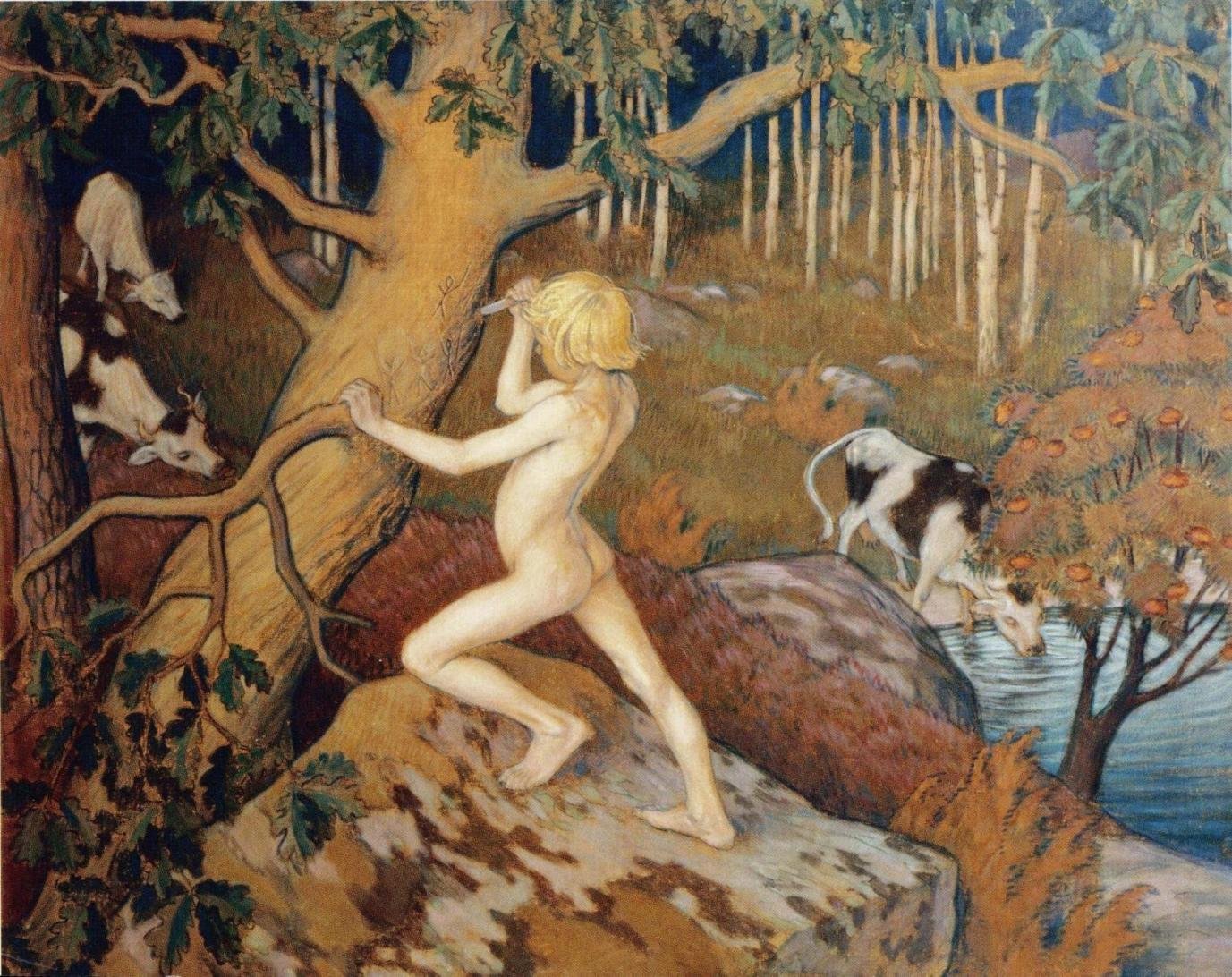 Väinö Blomstedtin maalaus Kalevalan Kullervosta, kuuluu yksityiskokoelmaan.